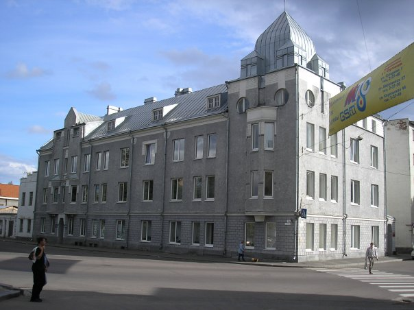 Дом купца Сиитонена (ныне мэрия города). Арх. Пааво Уотила